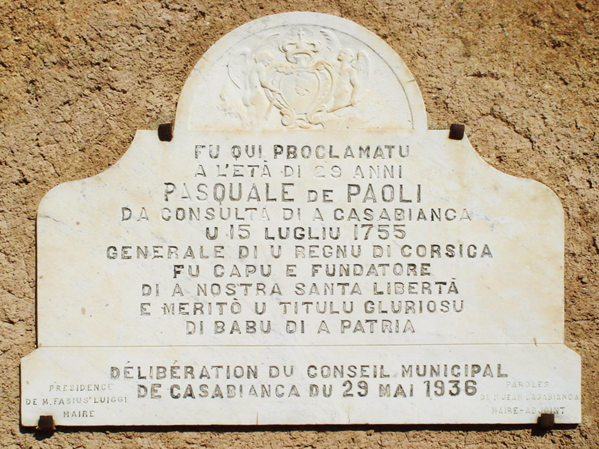 plaque commémorative au couvent Saint Antoine de Casabianca, Castagniccia, Corse, Corsica, Pasquale Paoli